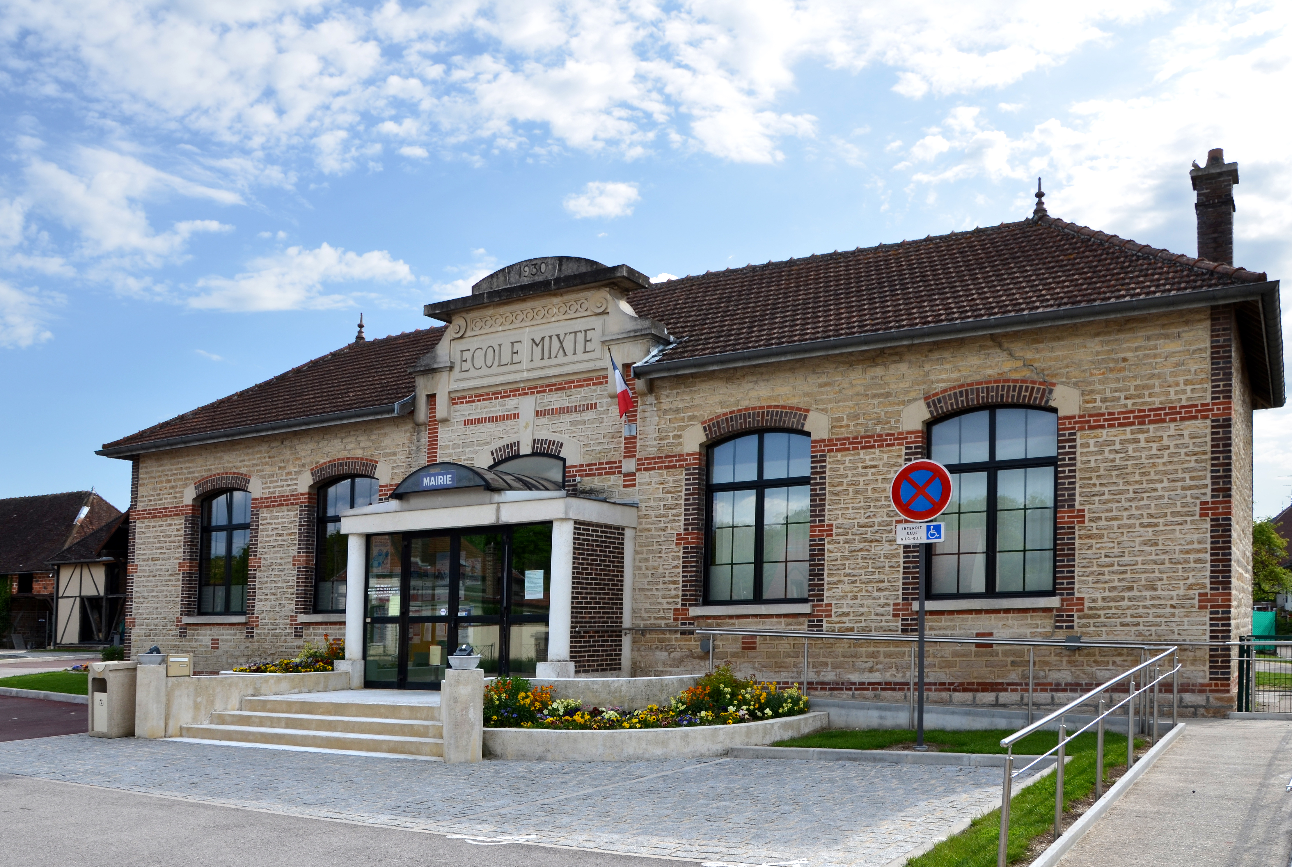 Mairie de-Barberey-St-Sulpice, Aube, France